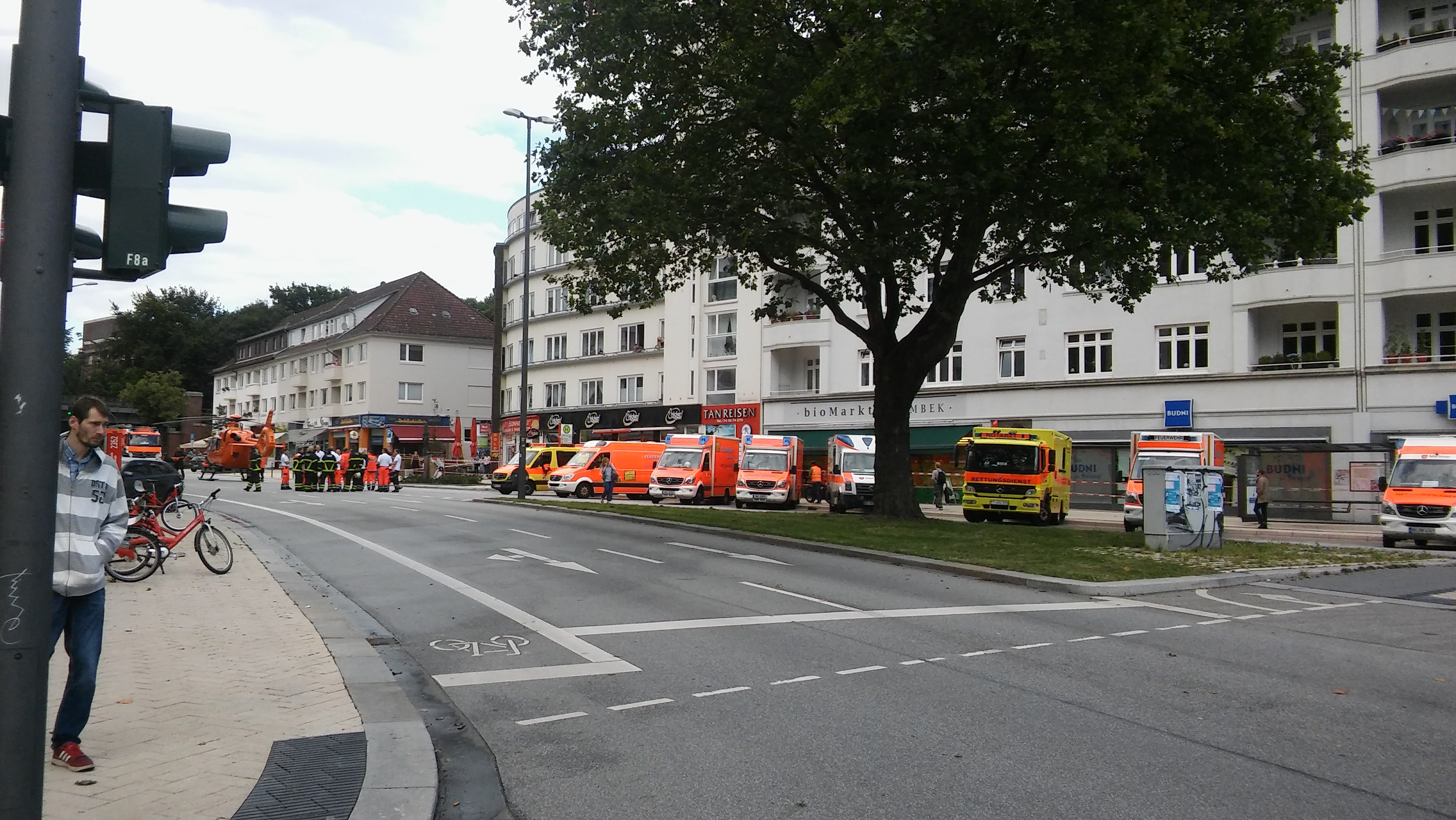 Messerattacke am 28. Juli 2017 im Hamburger Stadtteil Barmbek.